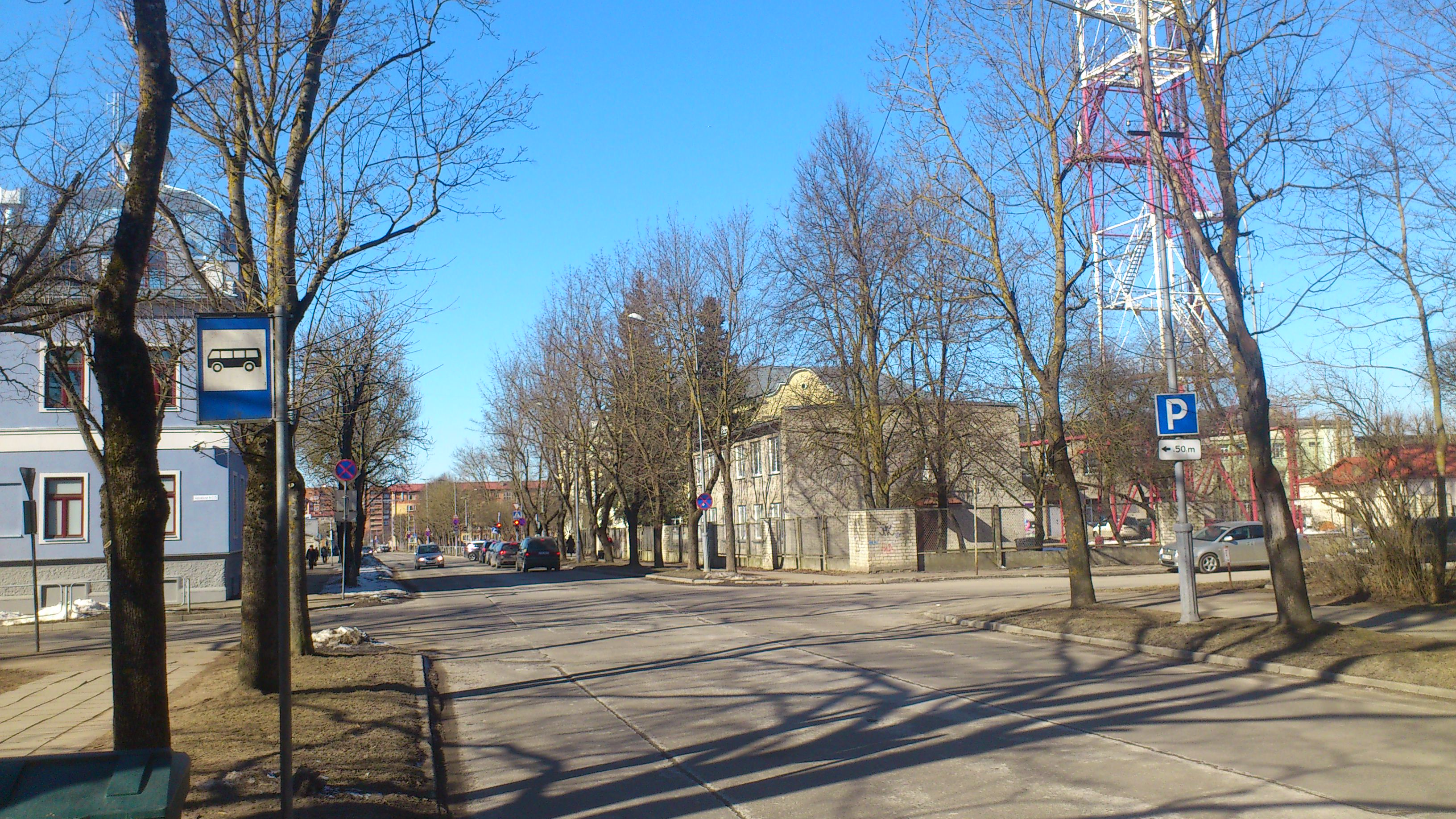 Hariduse tänav, Narva